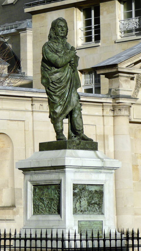 Statue de Dominique-Jean Larrey située dans la cour de l'Eglise du Val -de-Grace (Paris V)